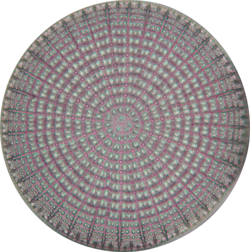 Diatom